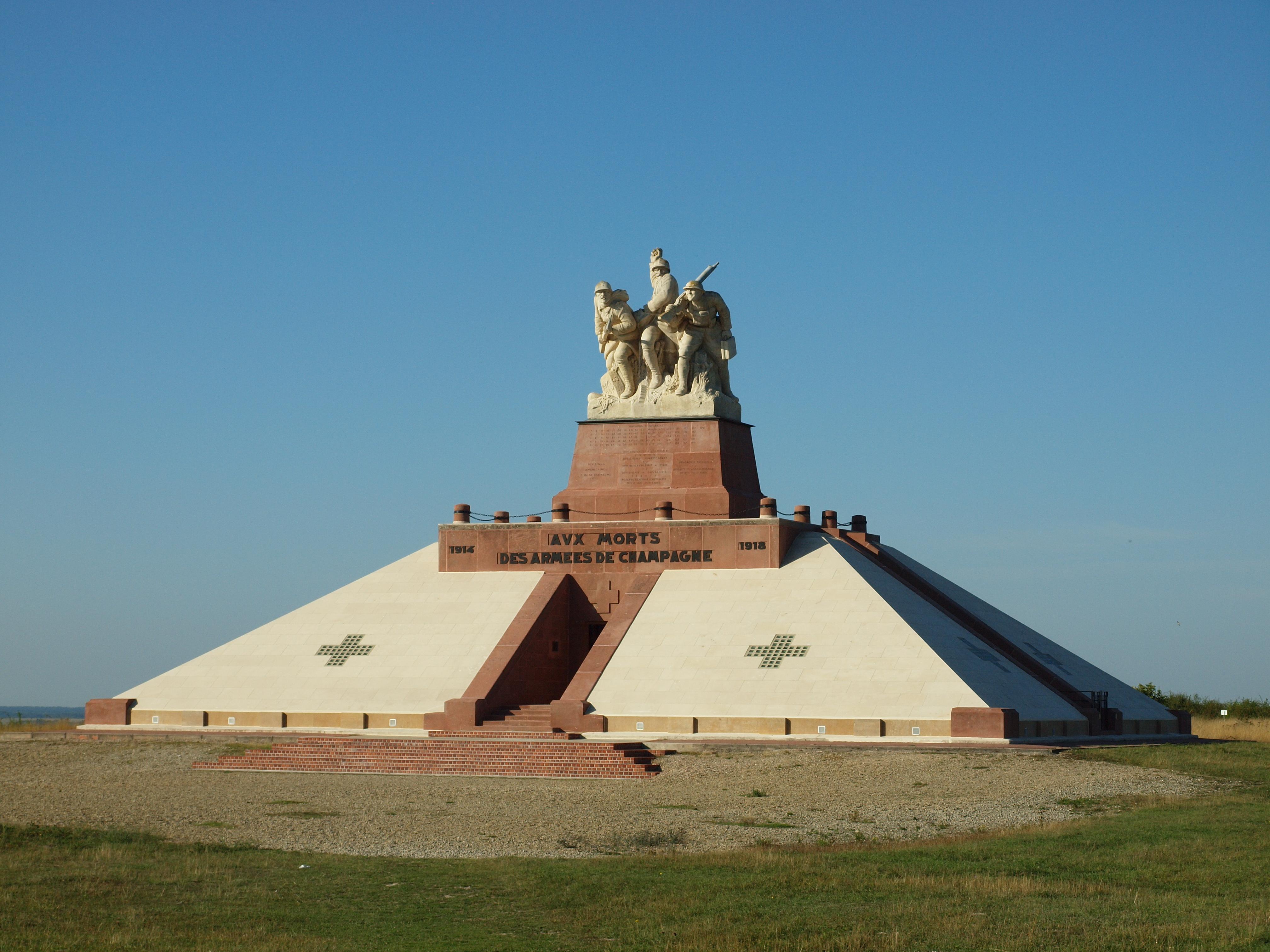 Monument aux morts des Armées de Champagne à Navarin (Marne)